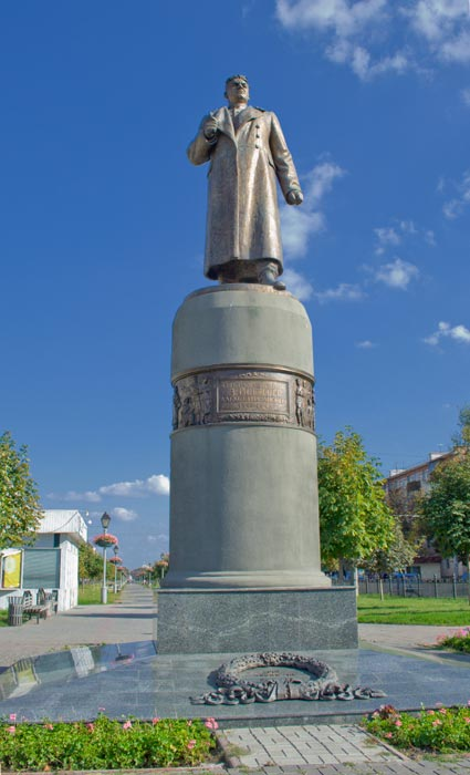 Памятник А.И. Зыгину в Полтаве. Авторы сульпторы - Кербель и Захаров.